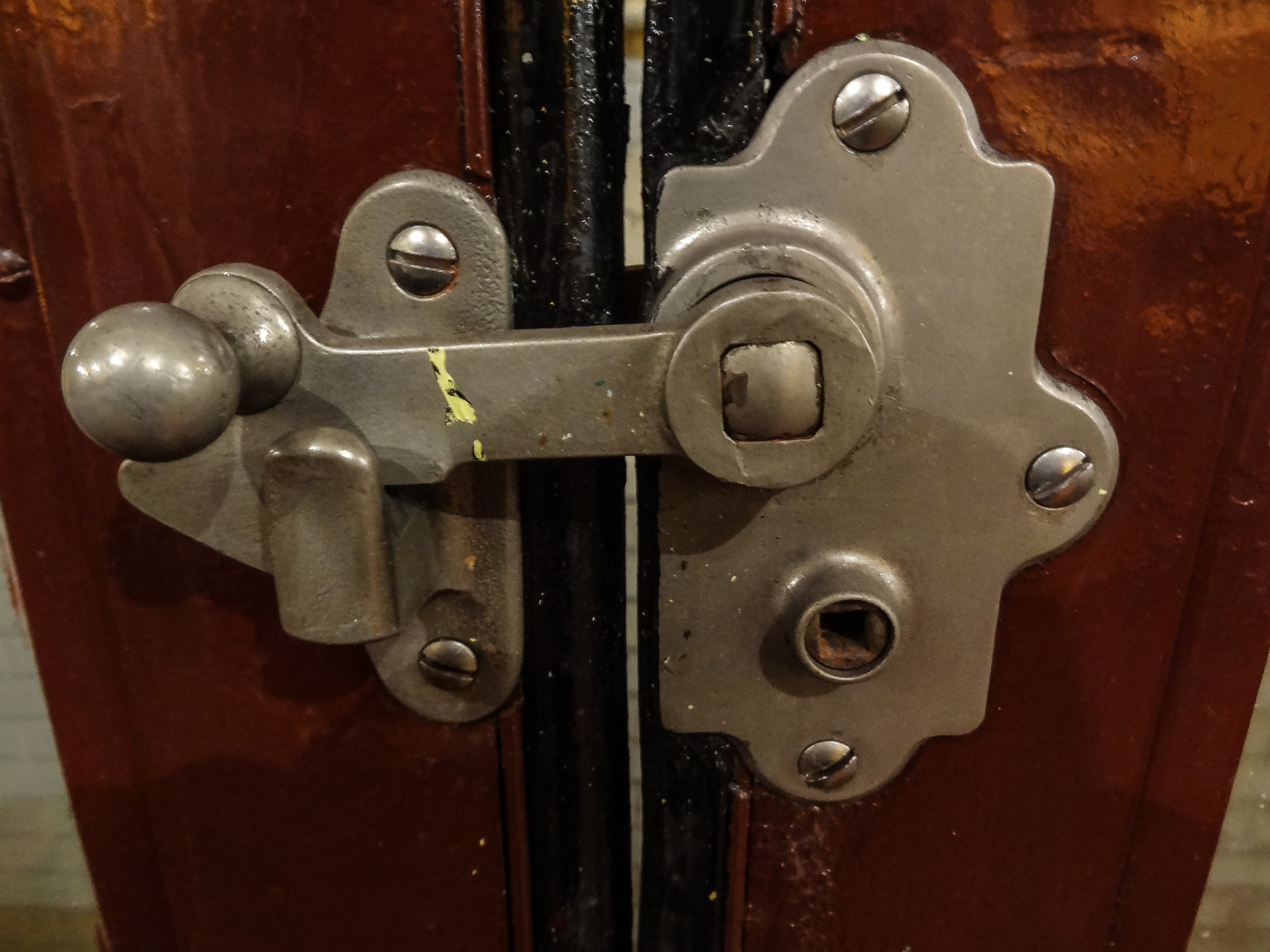 Journées du patrimoine 2012 : loquet de fermeture de la rame Sprague-Thomson.